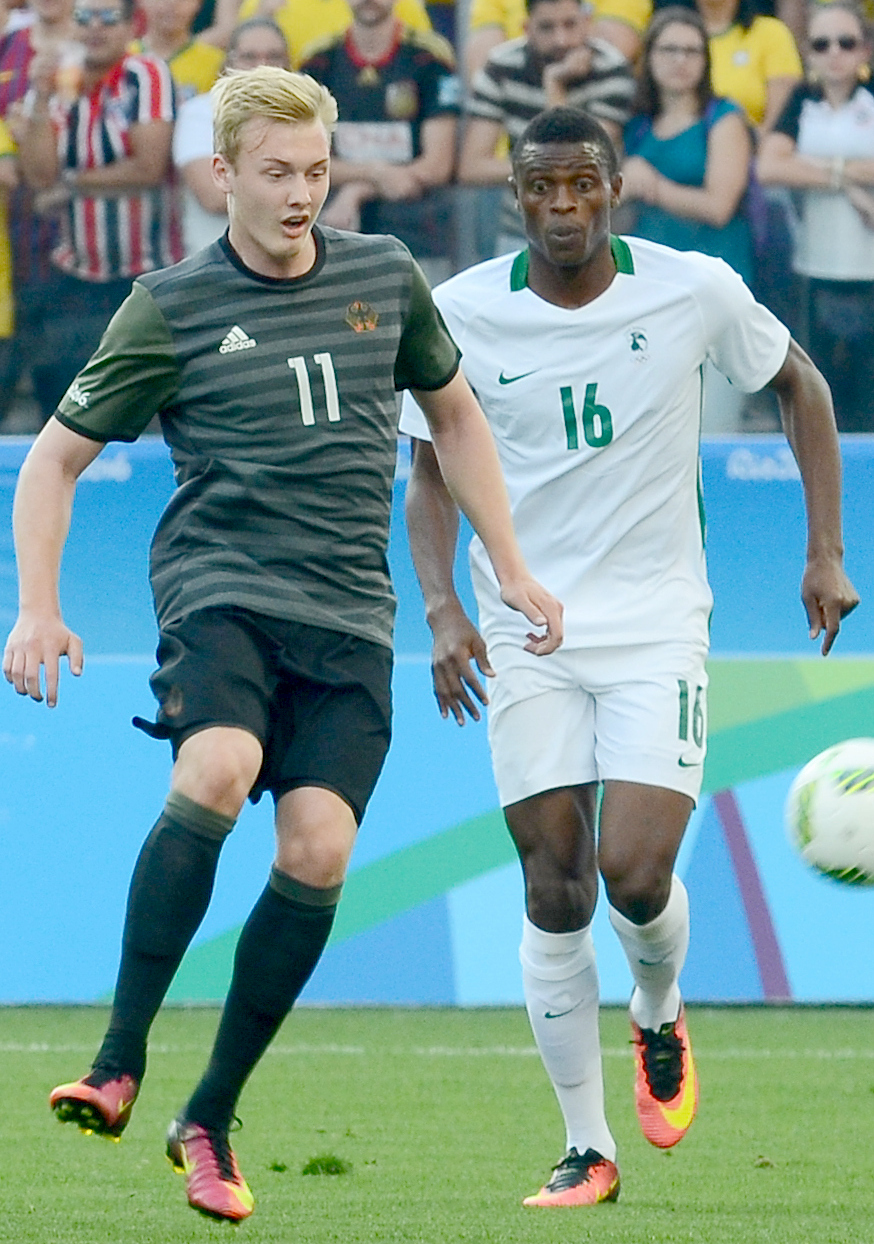 São Paulo - Alemanha vence a Nigéria por 2 a 0 e se classifica para a final na Arena Corinthians (Rovena Rosa/Agência Brasil)